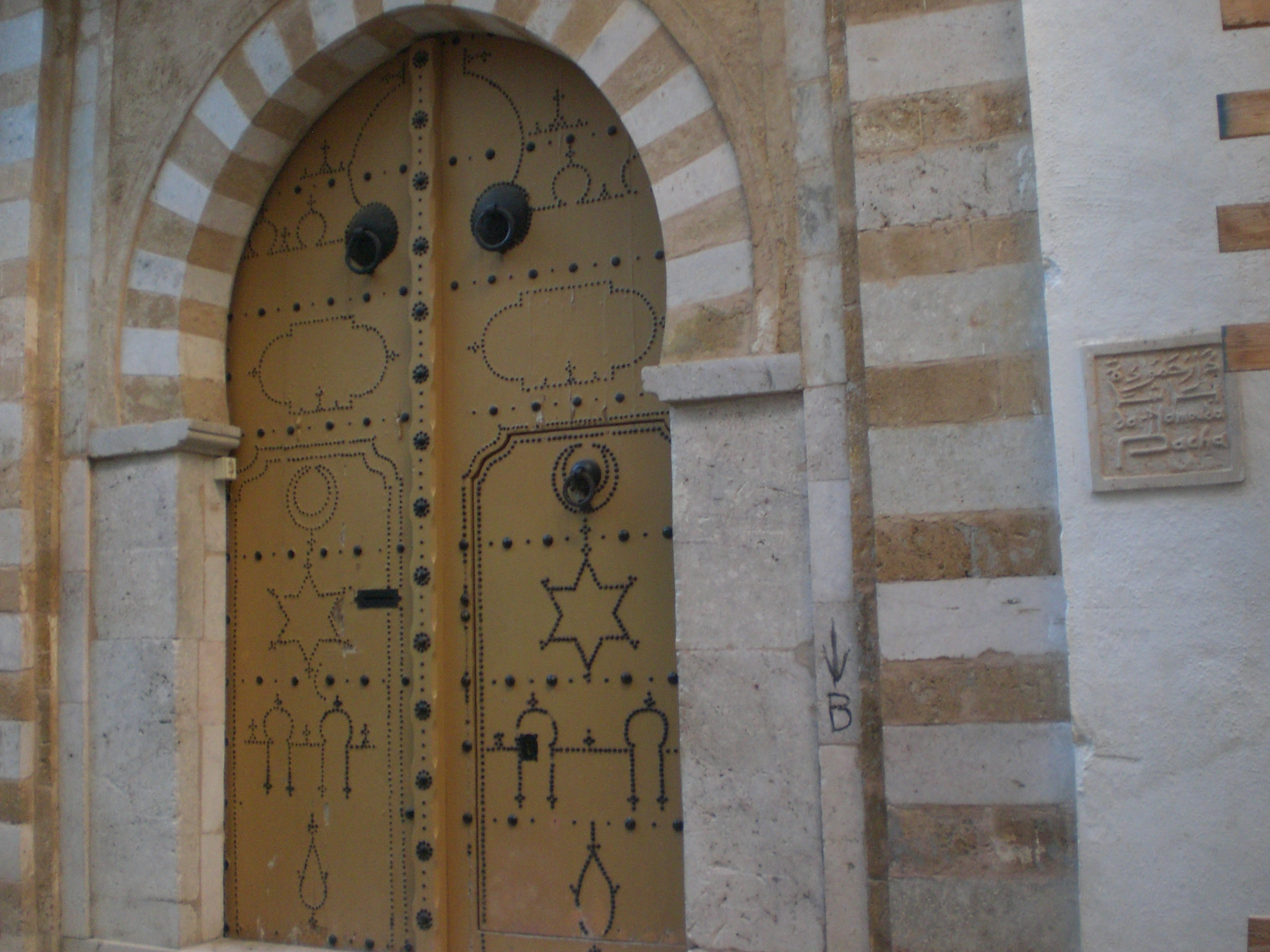 Dar Hammouda Pacha-Tunis